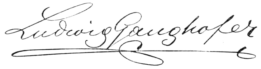 Unterschrift Ludwig Ganghofers